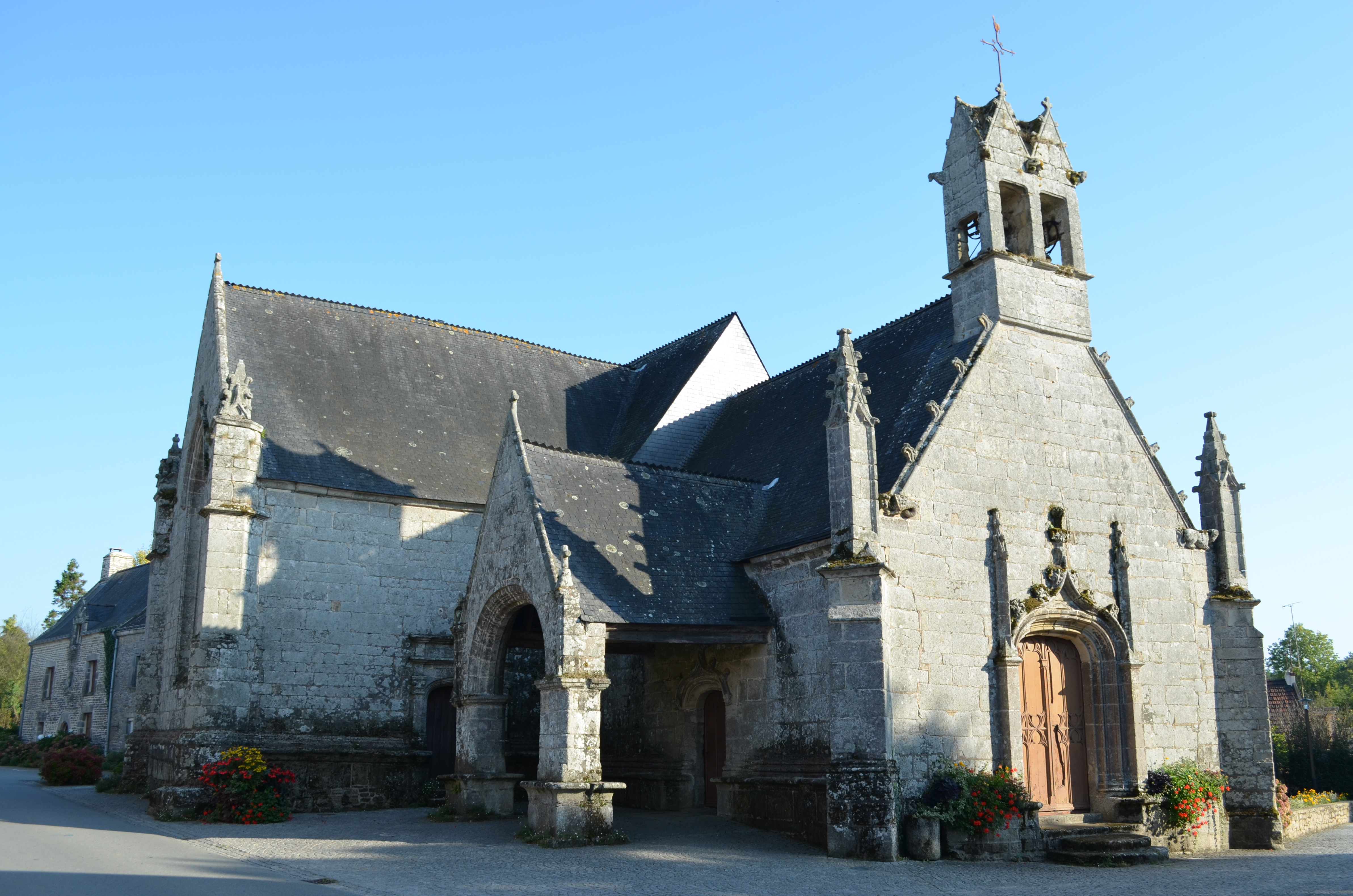 Église Saint-Jean-Baptiste de Gorvello (16e s.) - Sulniac (Morbihan) .